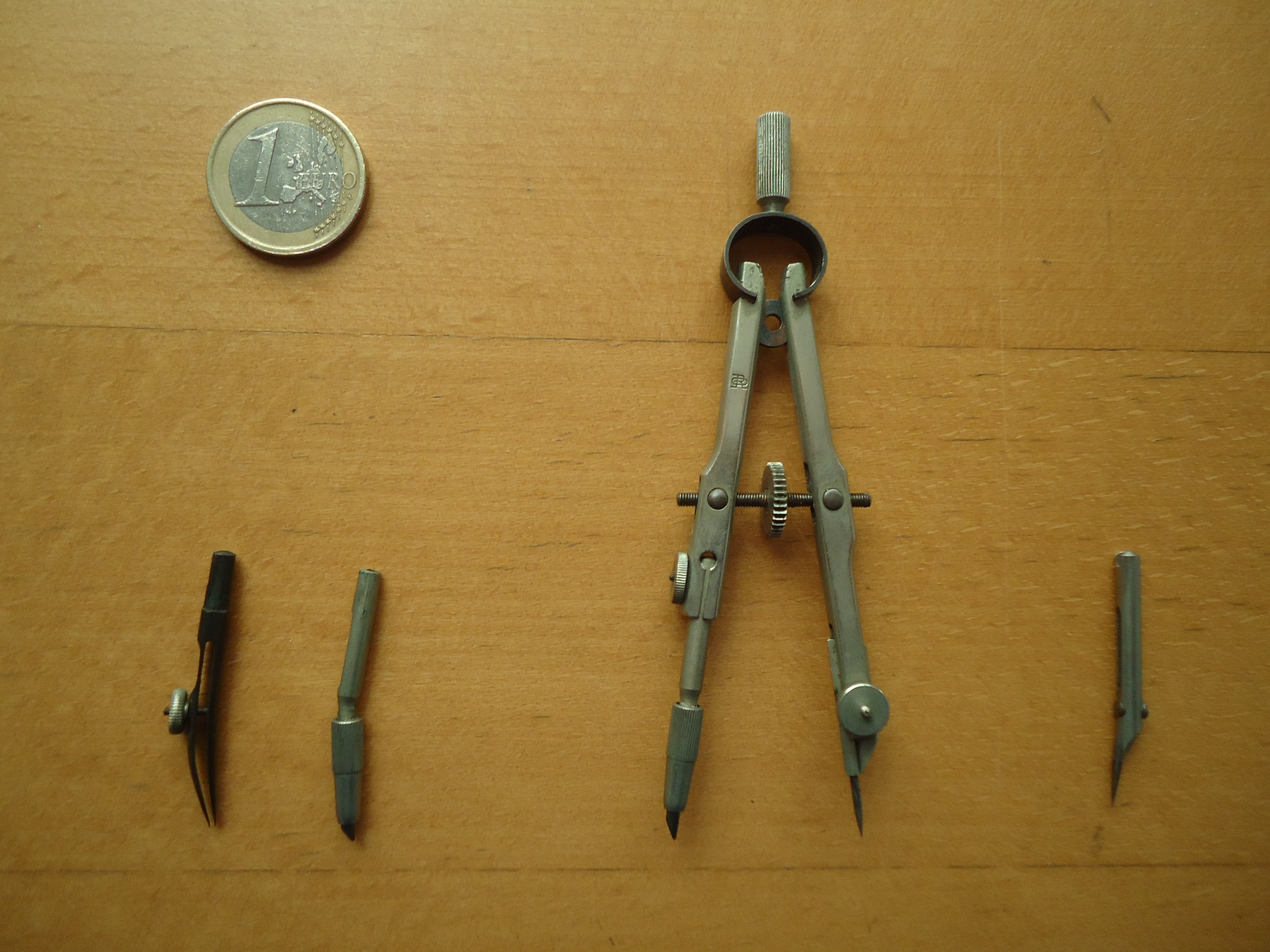 Caja de compases (E.O. Richter&Co). Bigotera y sus utensilios